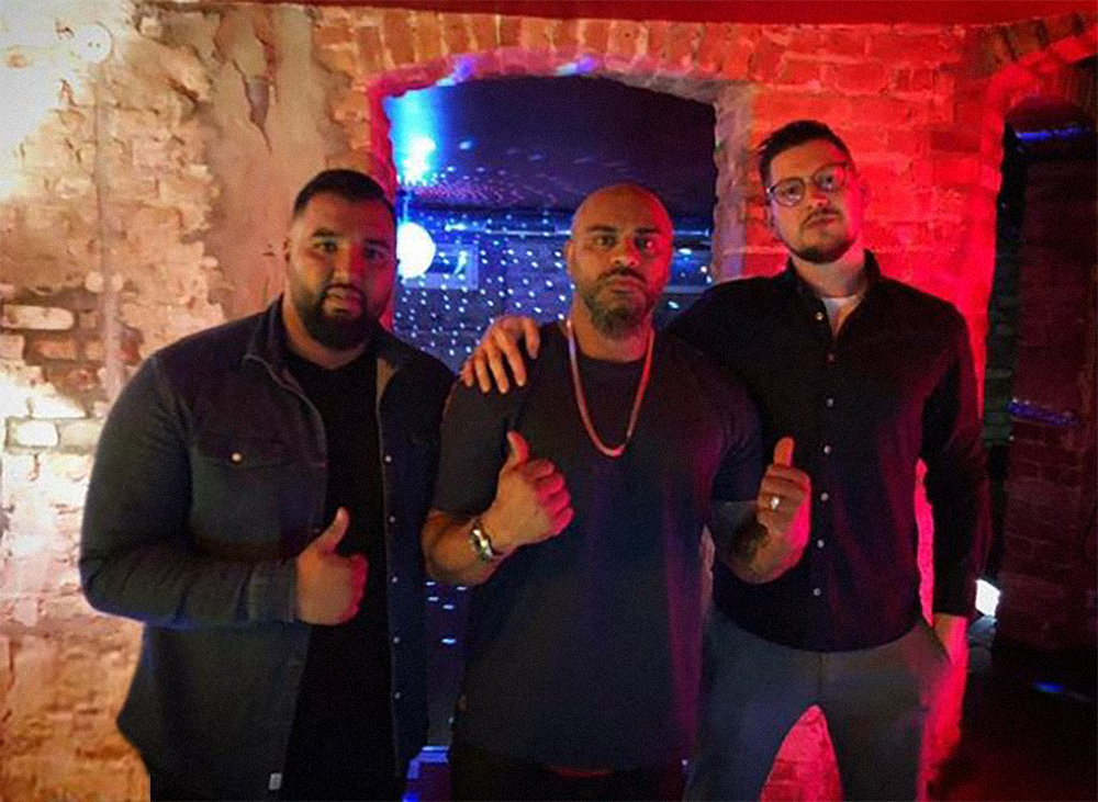 Asfand Saeed, Massiv und J.S. Kuster